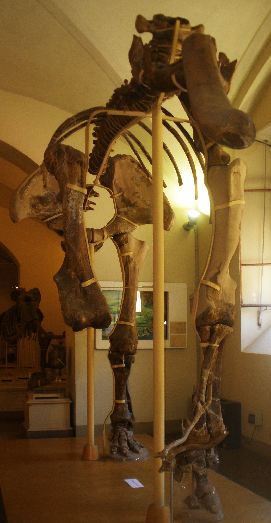 Fossil of Mammuthus, an extinct mammal- Took the picture at Museo di Paleontologia di Firenze. Museo di Storia Naturale di Firenze.